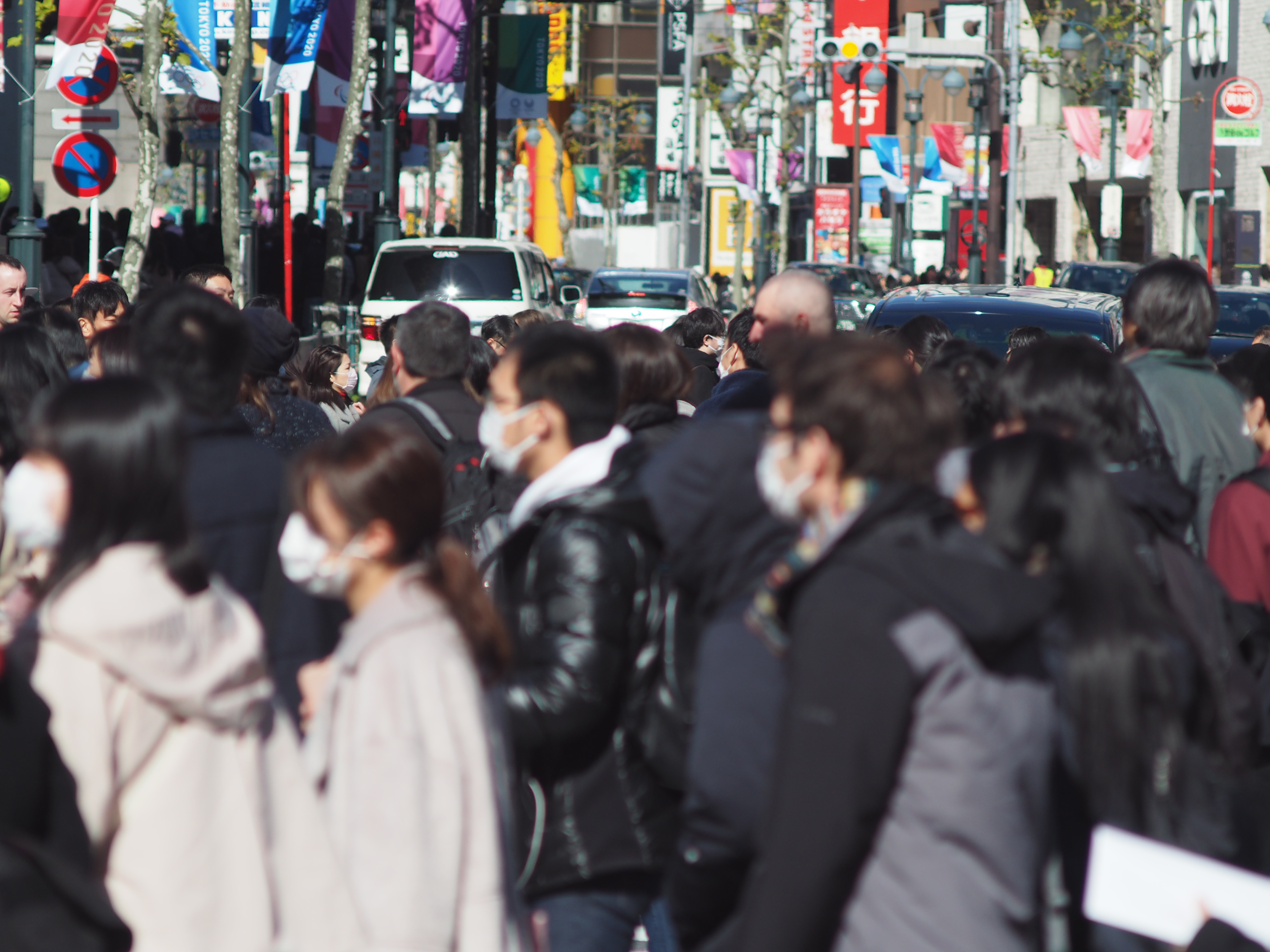 Shibuya